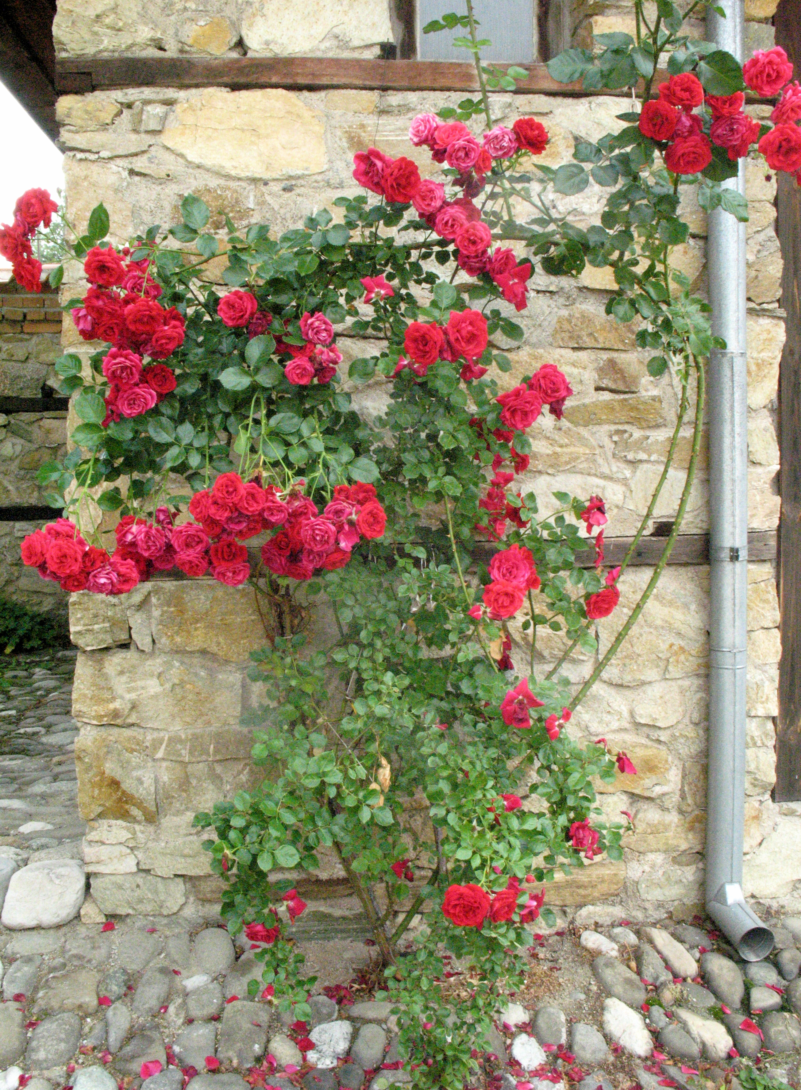 Къща-Музей "Дечко Узунов", Казанлък